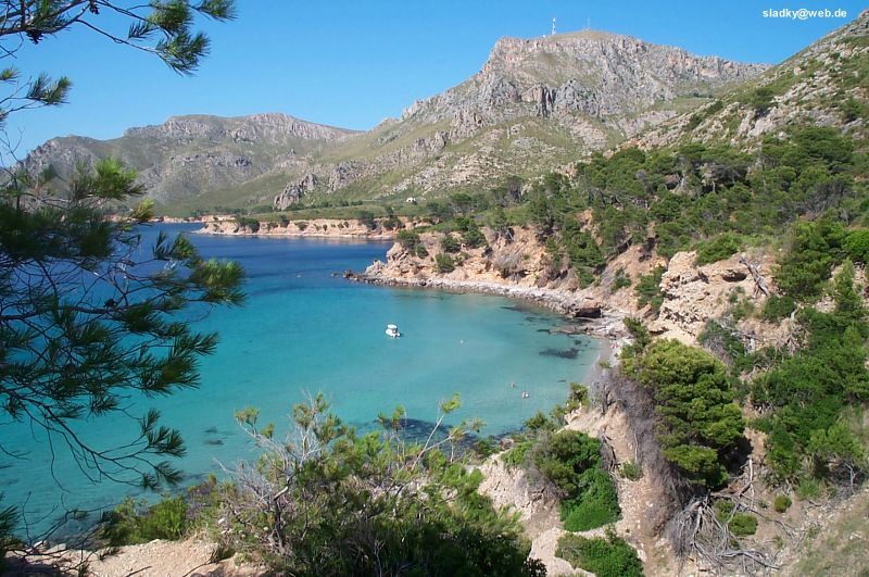 Mallorca Schweinebucht